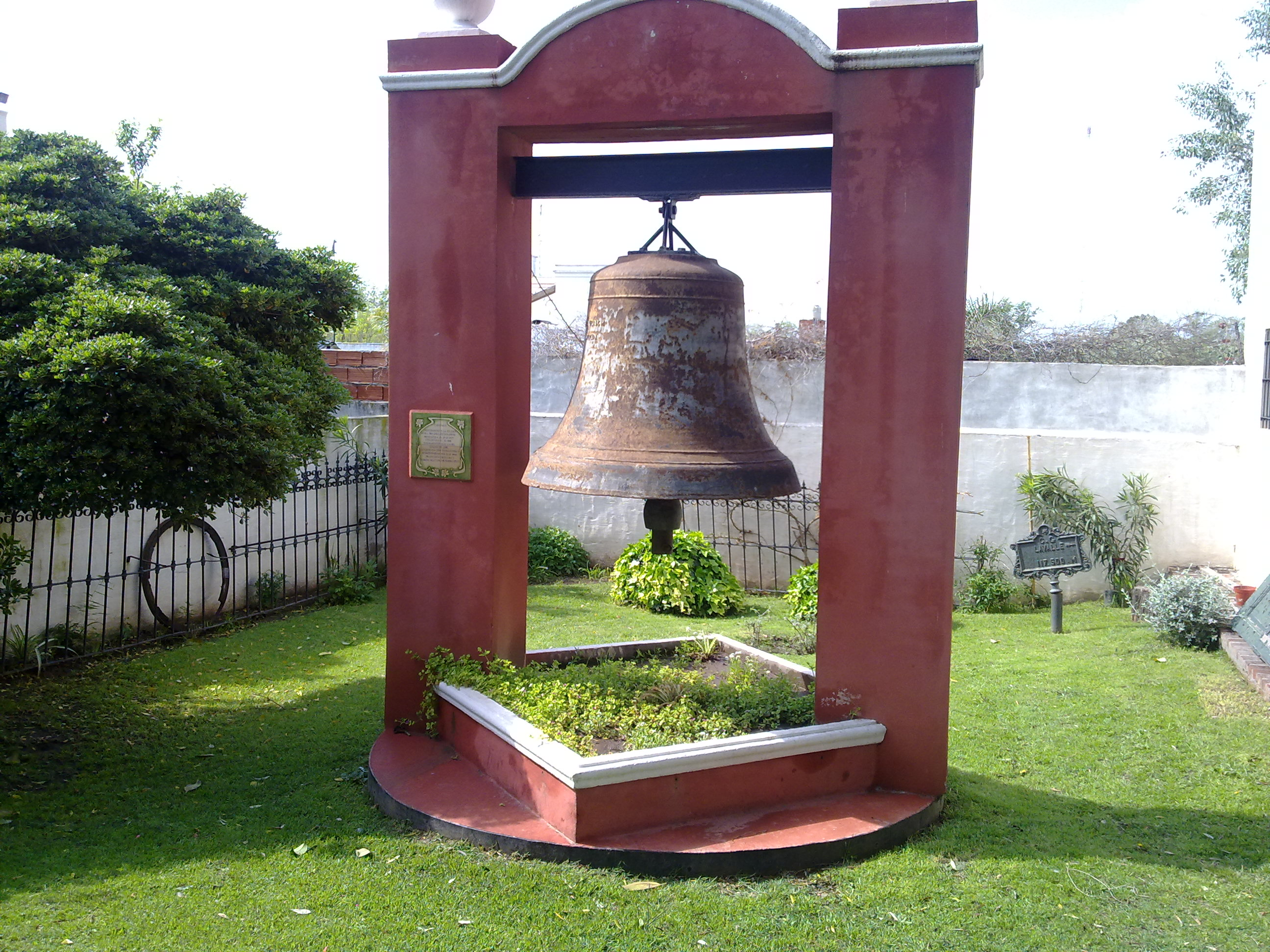 Foto tomada en el provincia de de Buenos Aires